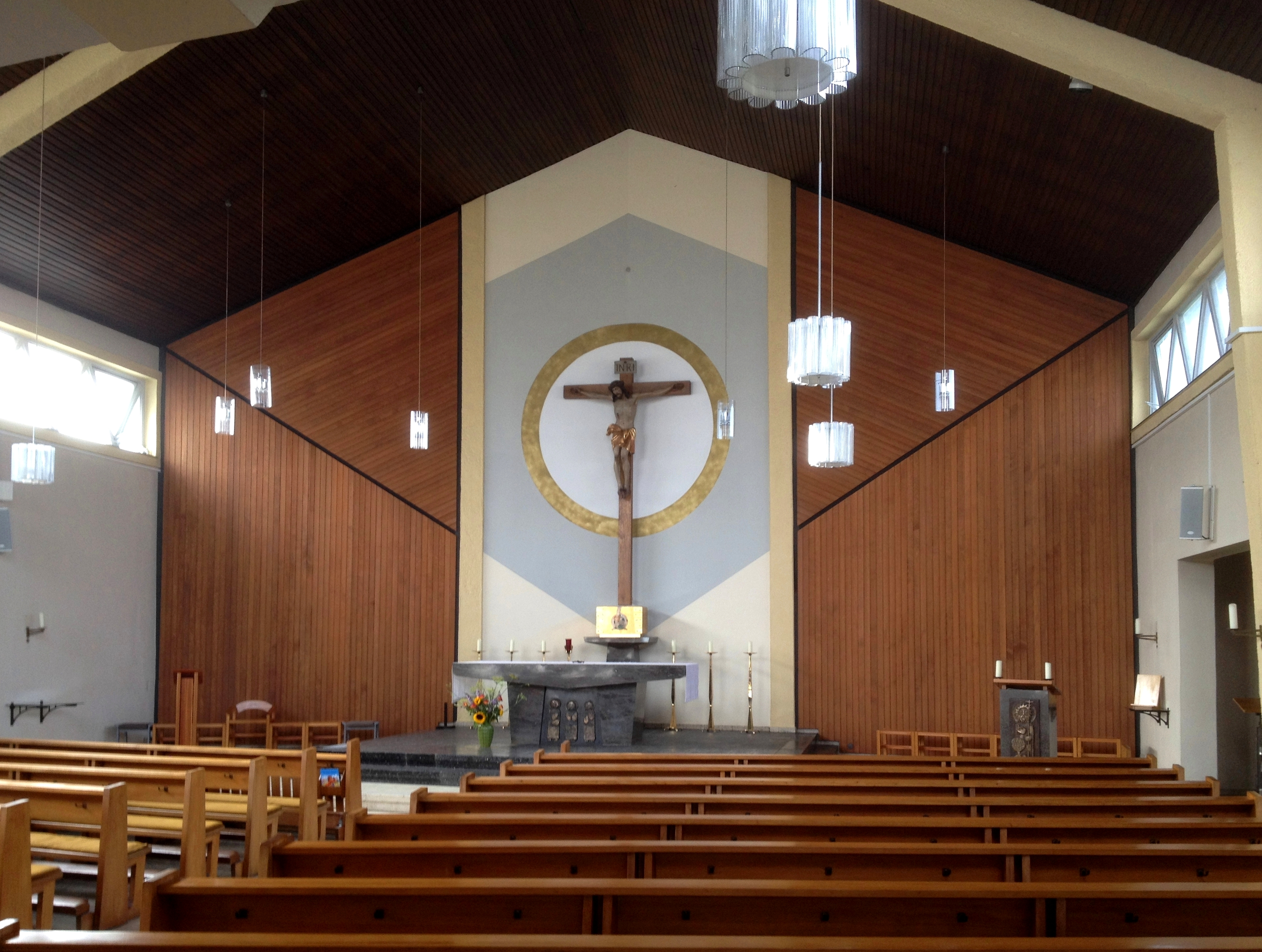 Bad Münder, kath. Pfarrkirche St. Johannes der Täufer